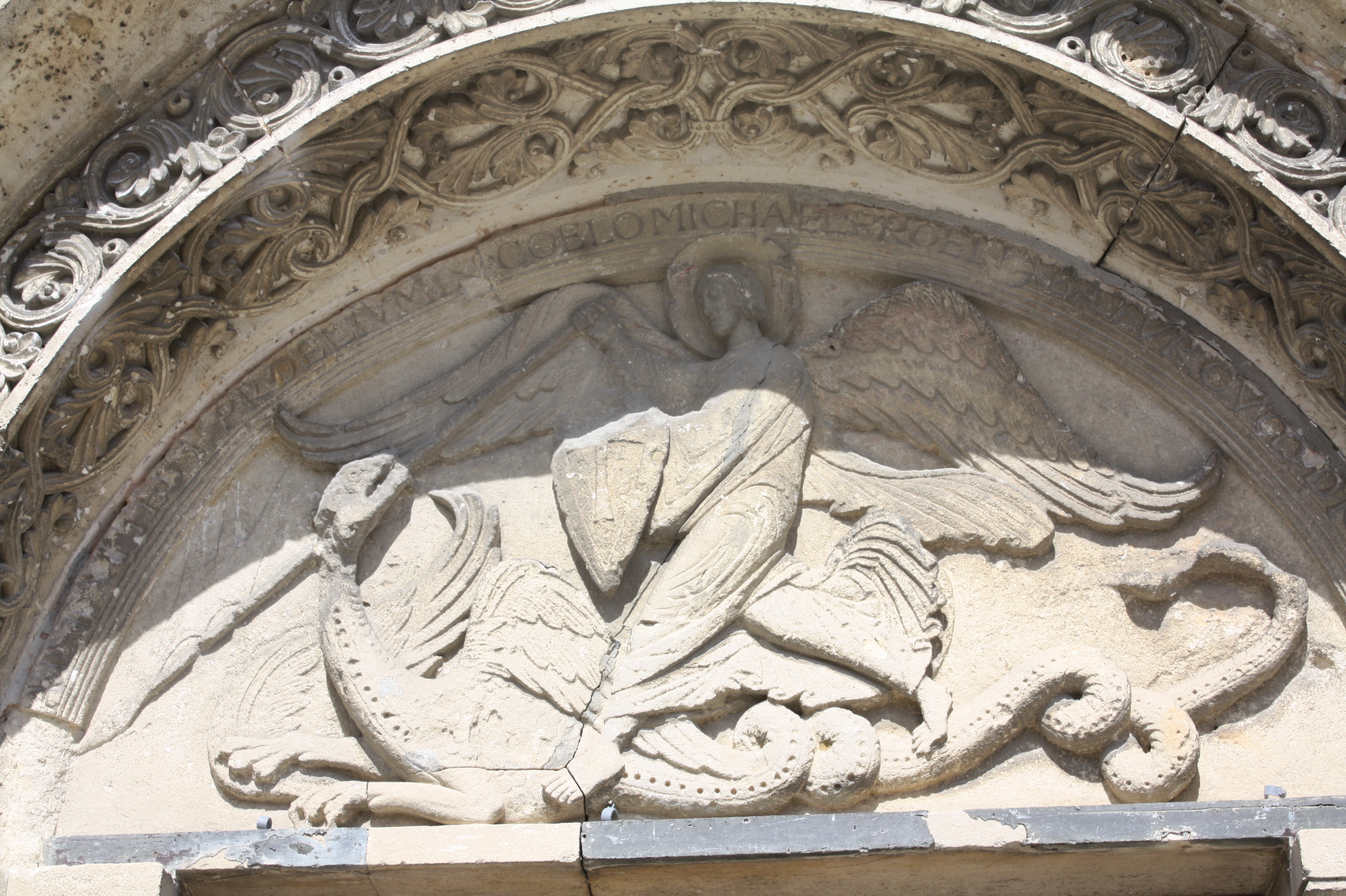 Église de Saint-Michel (Classé) .